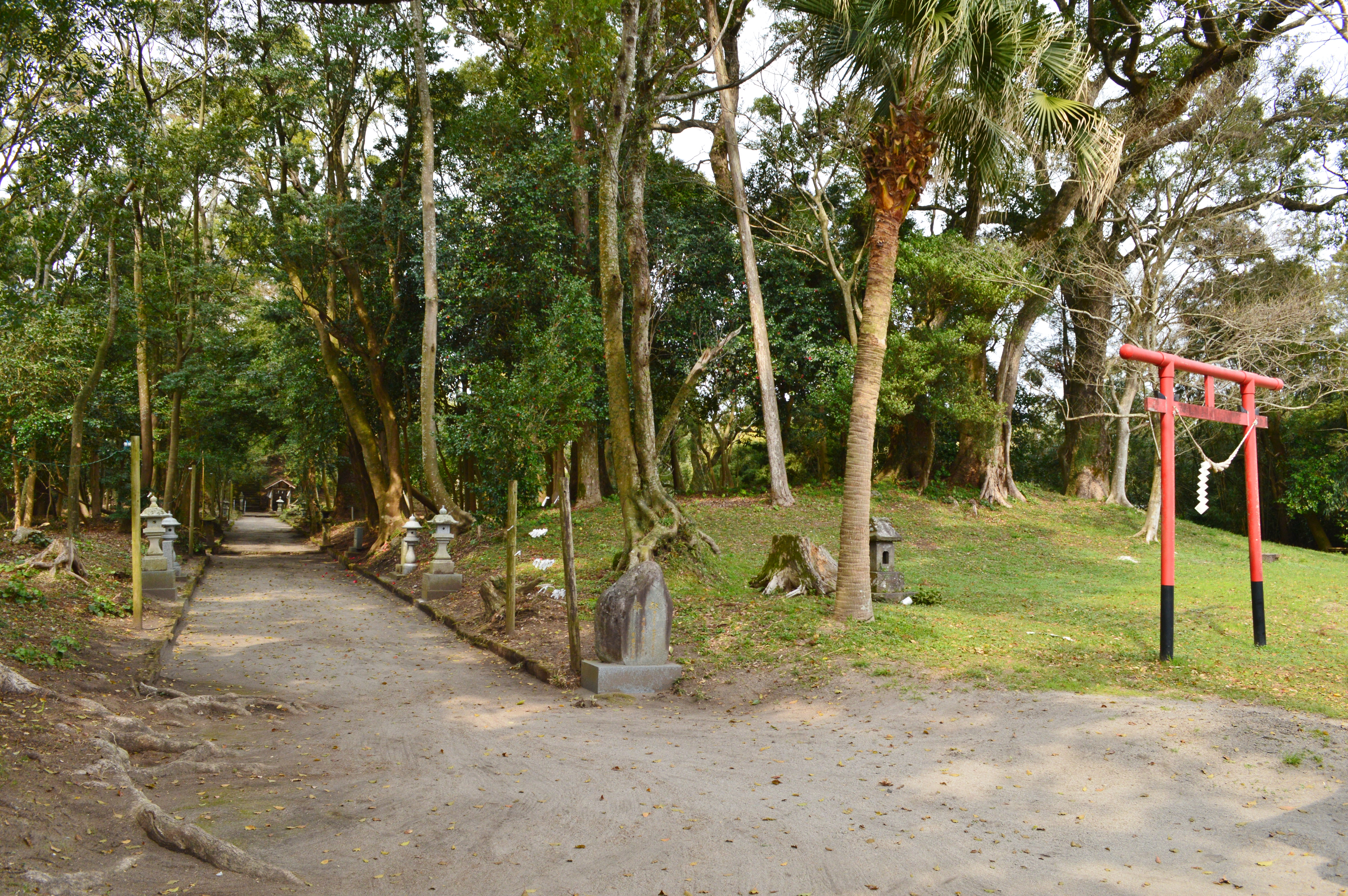 唐仁大塚古墳 (唐仁1号墳) 墳丘